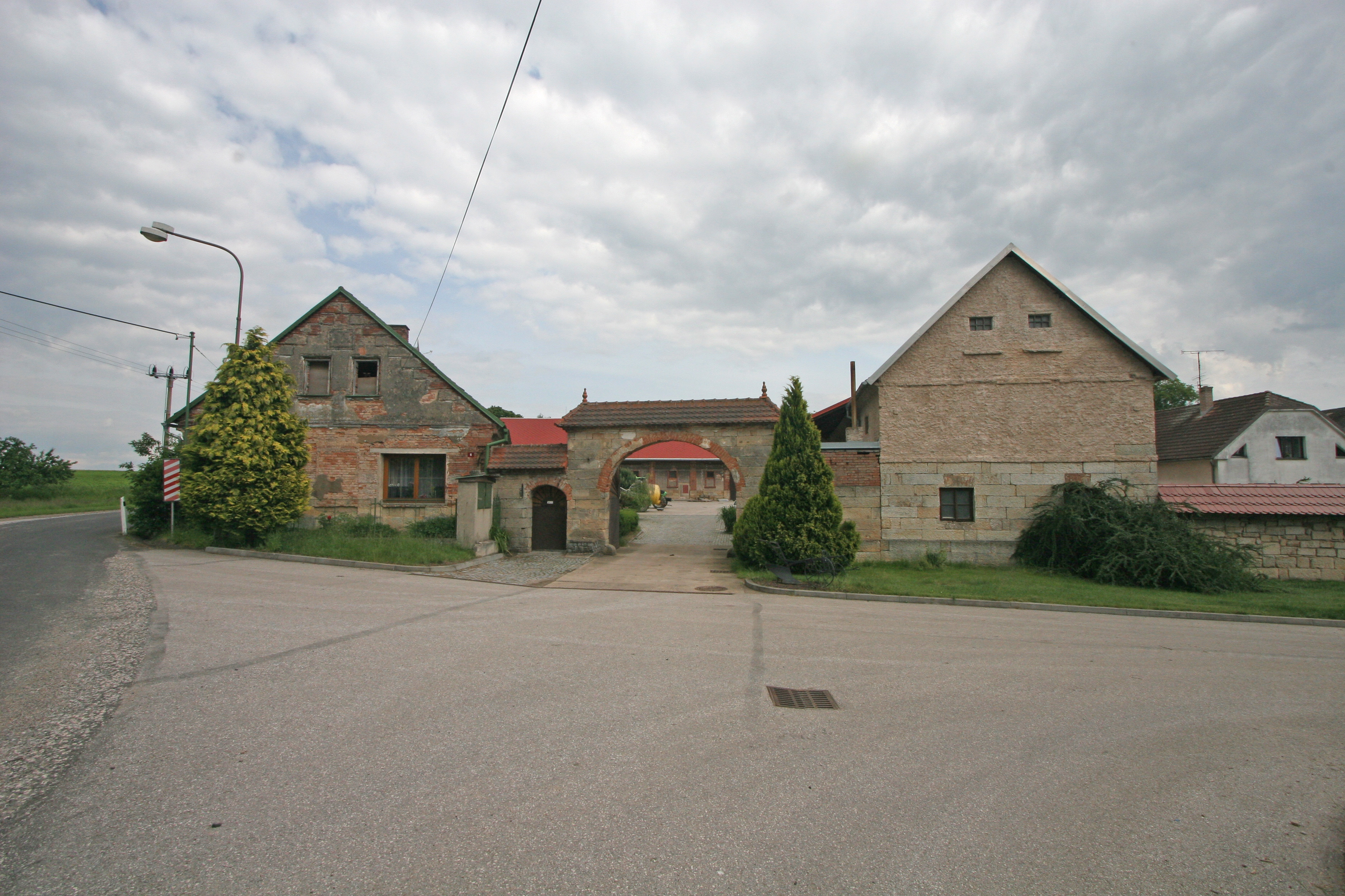 Želkovice vjezd do dvora